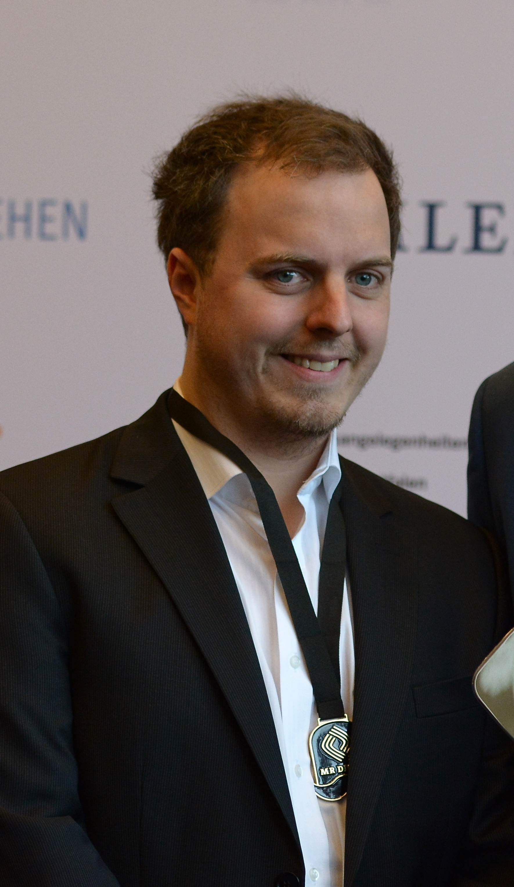 Verleihung des Grimme-Preises 2015.